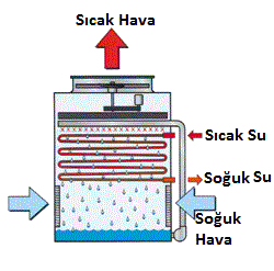 kapalı çevrim soğutma kulesi çalışma prensibi